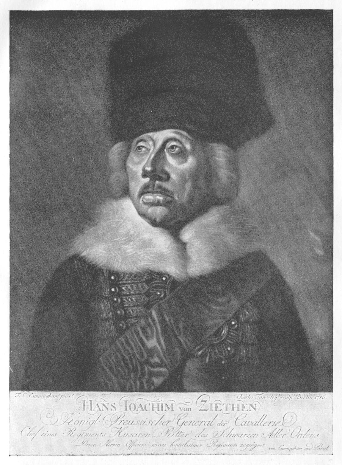 Ганс Иоахим фон Цитен